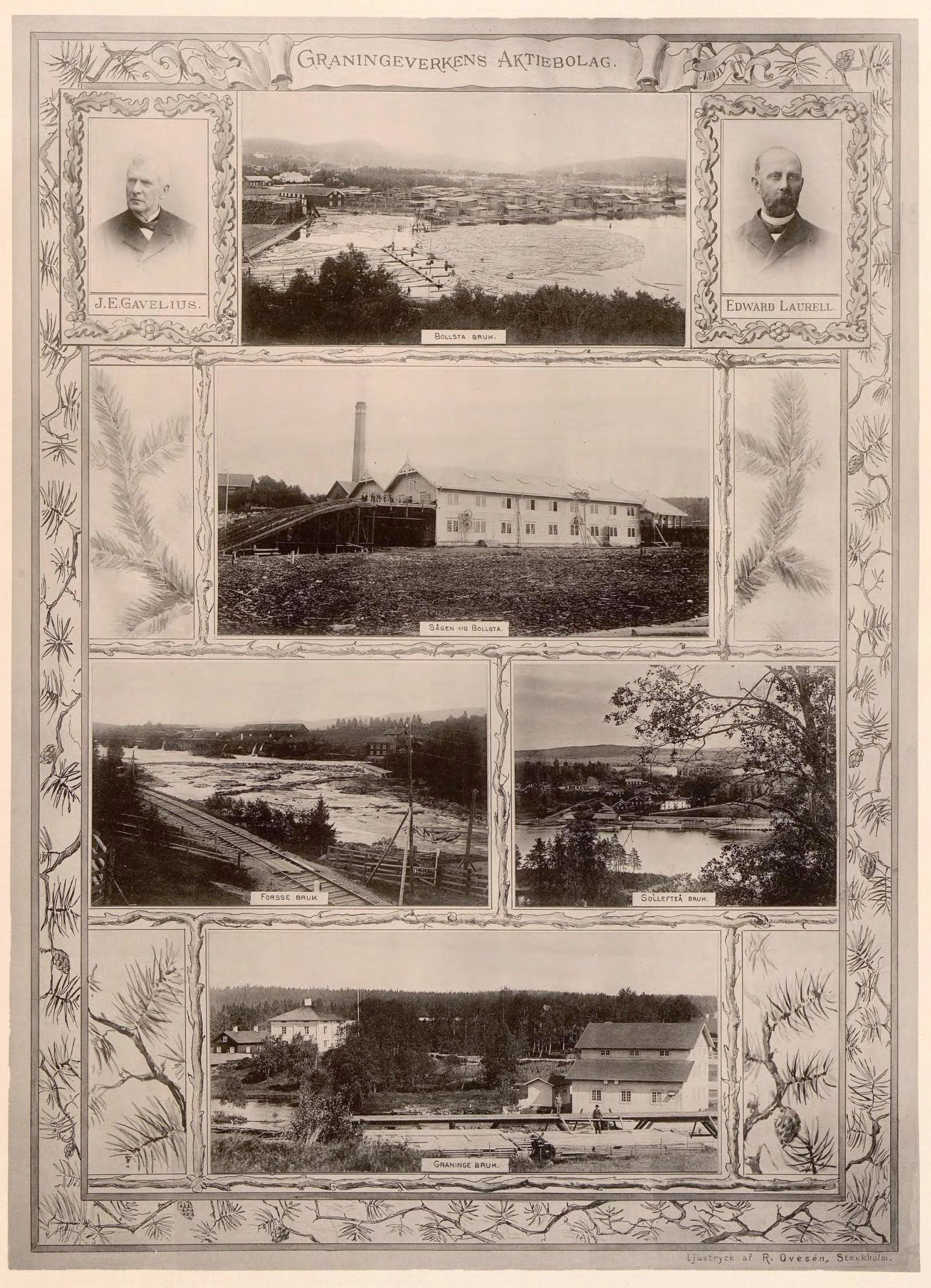 Graningeverken